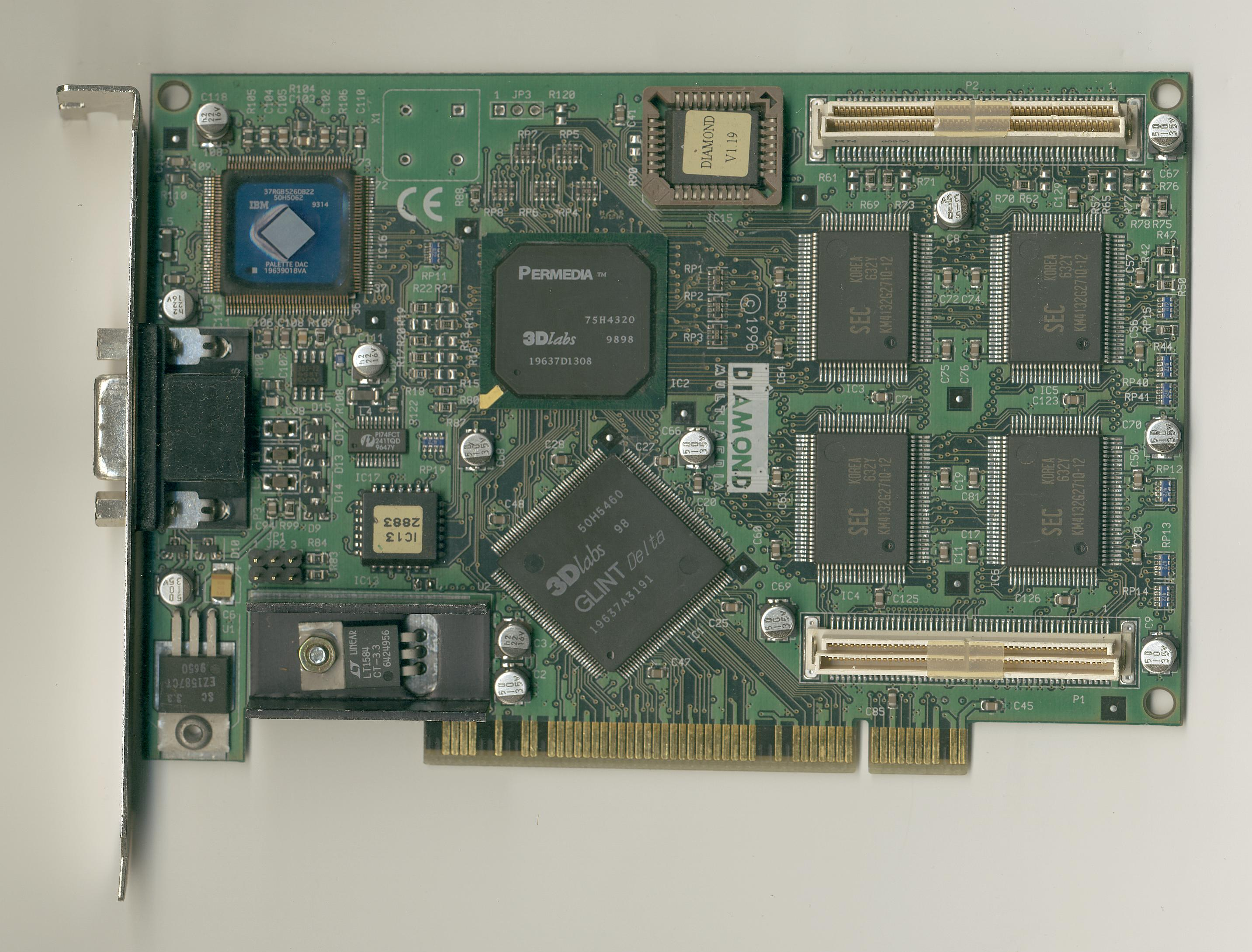 Diamond Multimedia FireGL1000 PCI (3Dlabs Permedia/GLINT Delta)